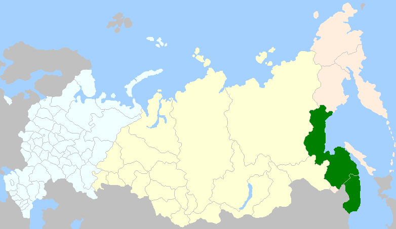 régions administratives occupées en 2008 par les Oudegeïs